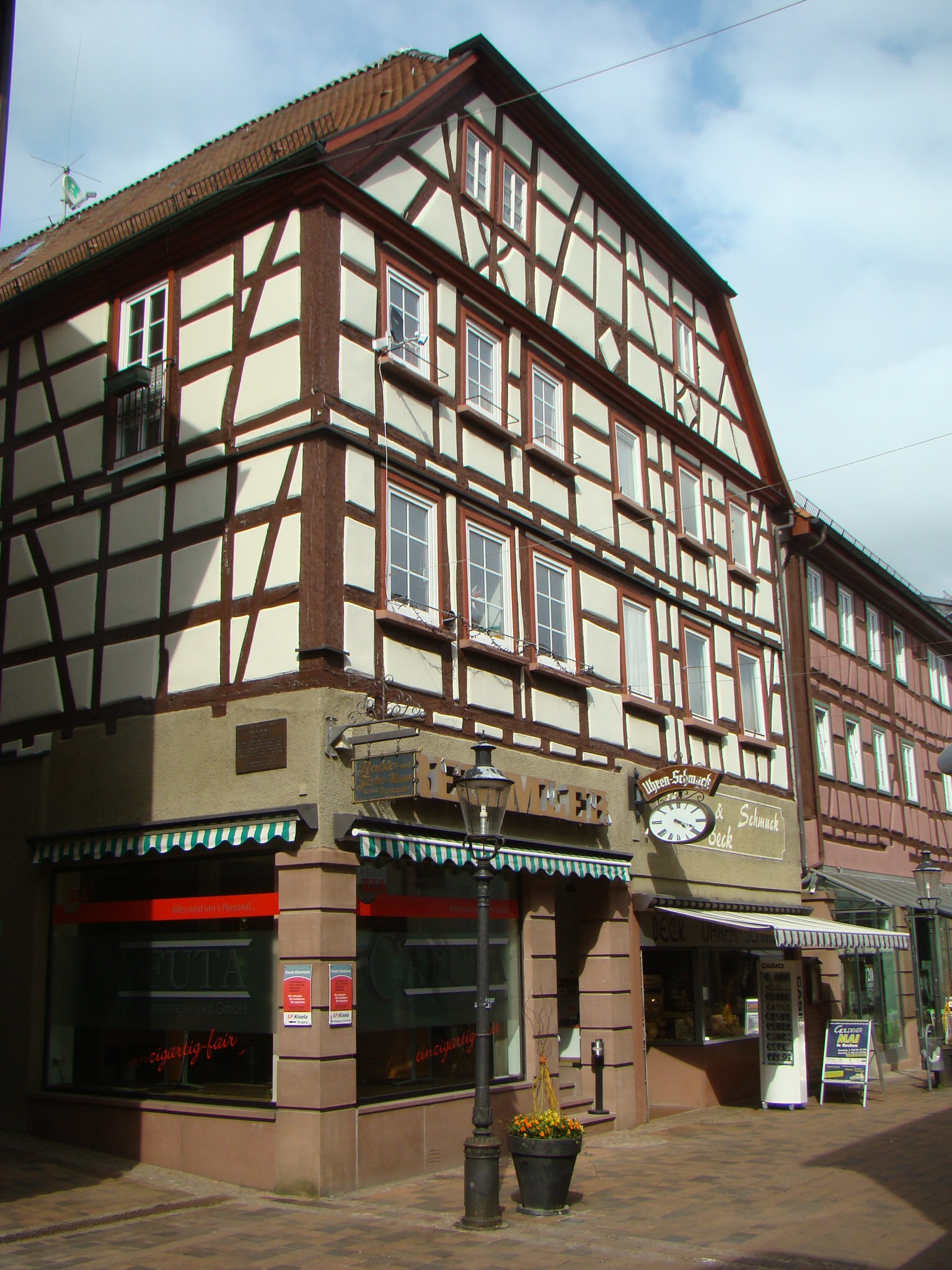 Buchen (Odenwald), Geburtshaus des Heimatdichters Jakob Mayer